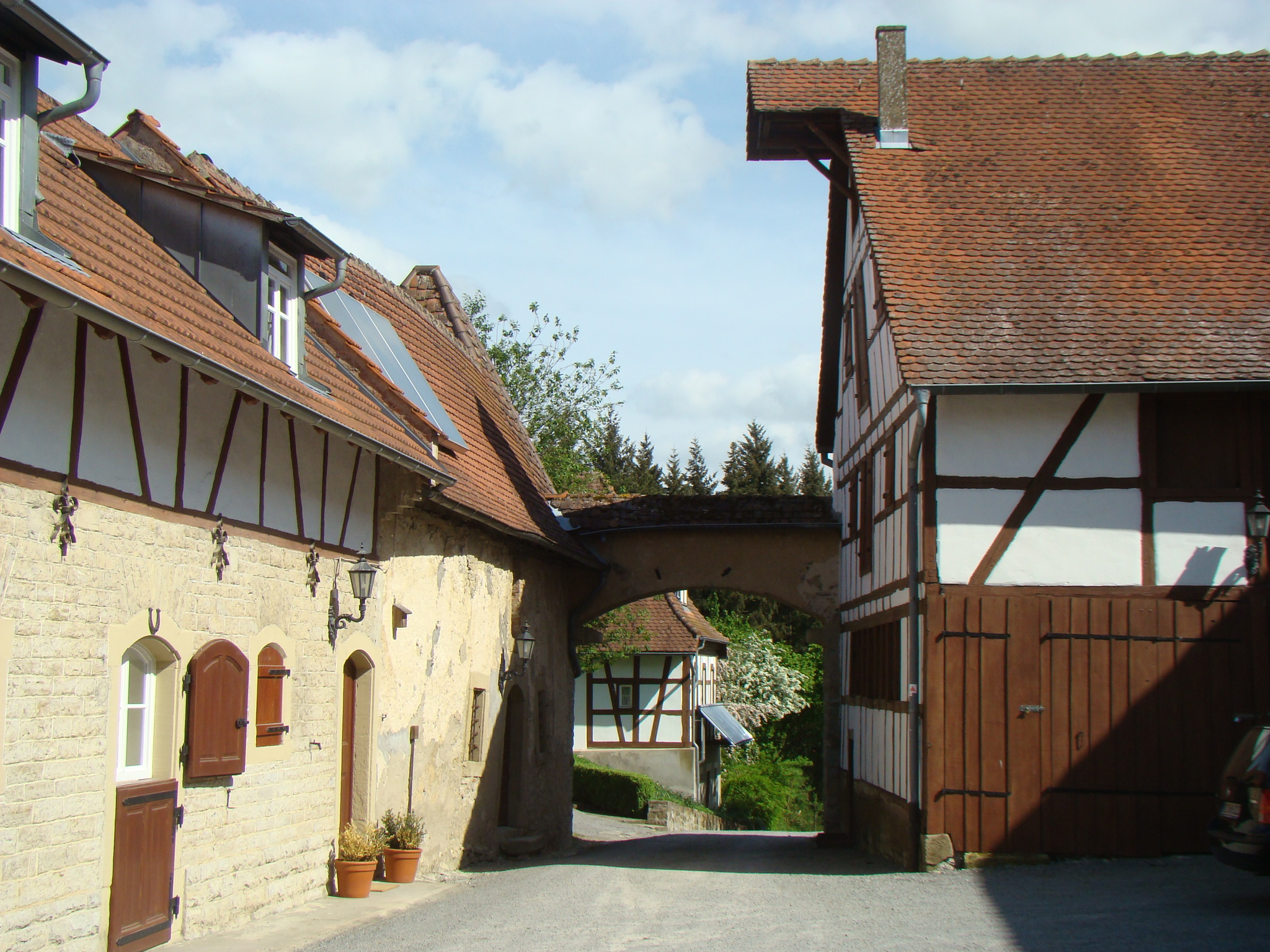 Sinsheim-Ehrstädt, Schloss Neuhaus, Nebengebäude